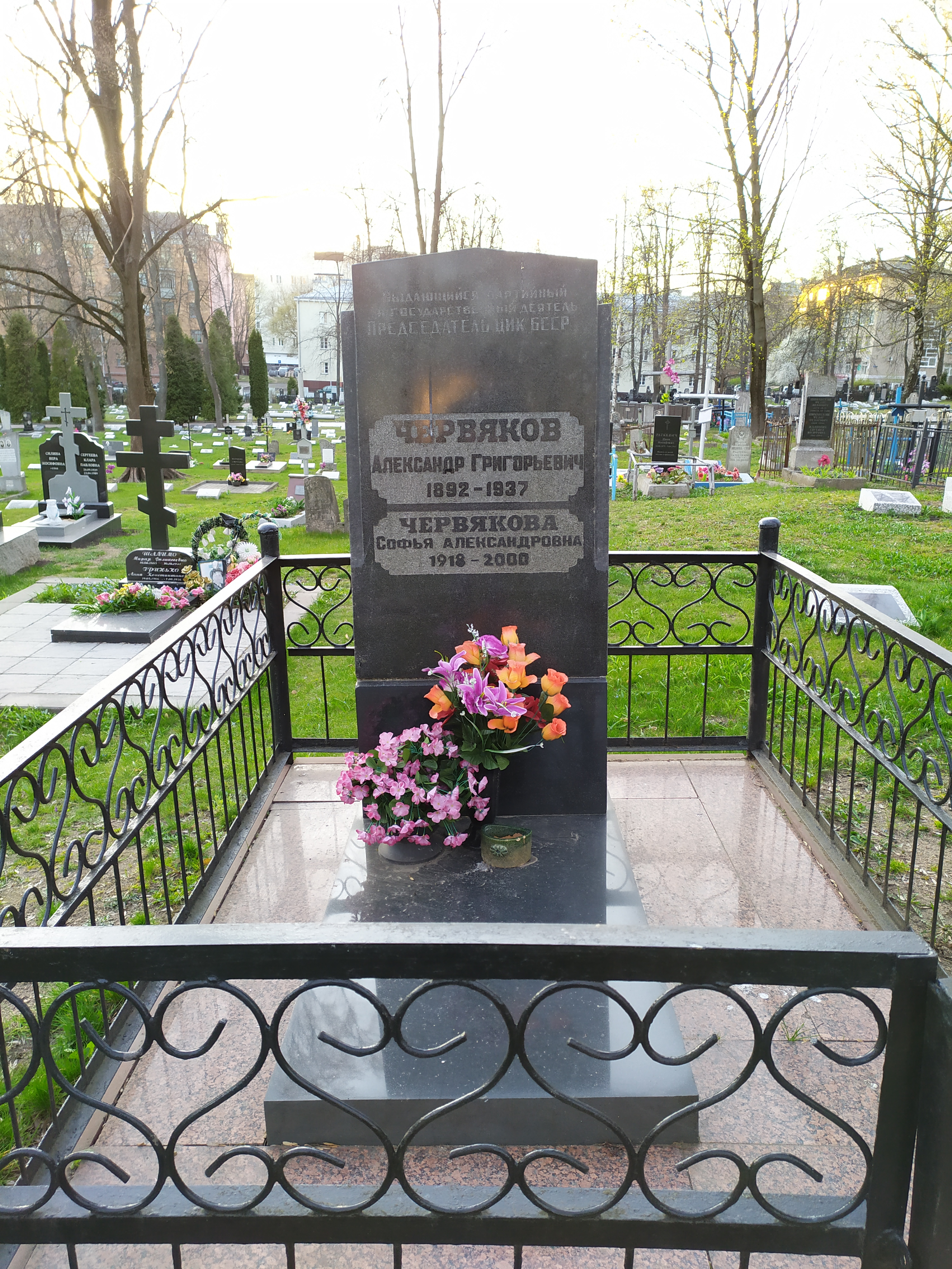 Магіла Аляксандра Чарвякова на Вайсковых могілках у Мінску.